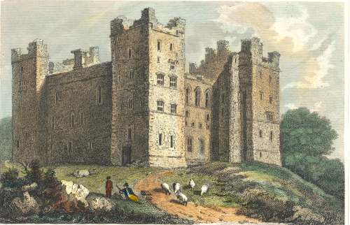 Lithographie Bolton Castle